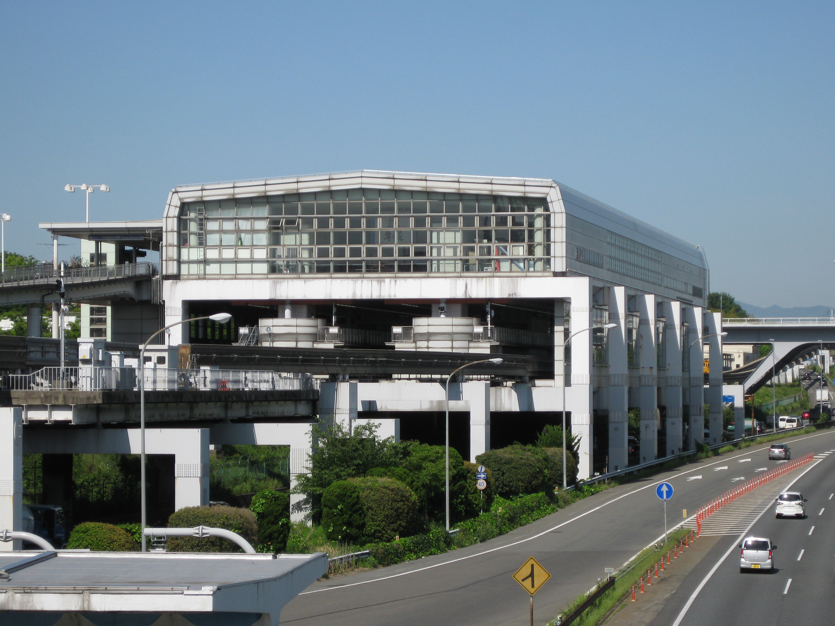 中央橋から見た万博記念公園駅